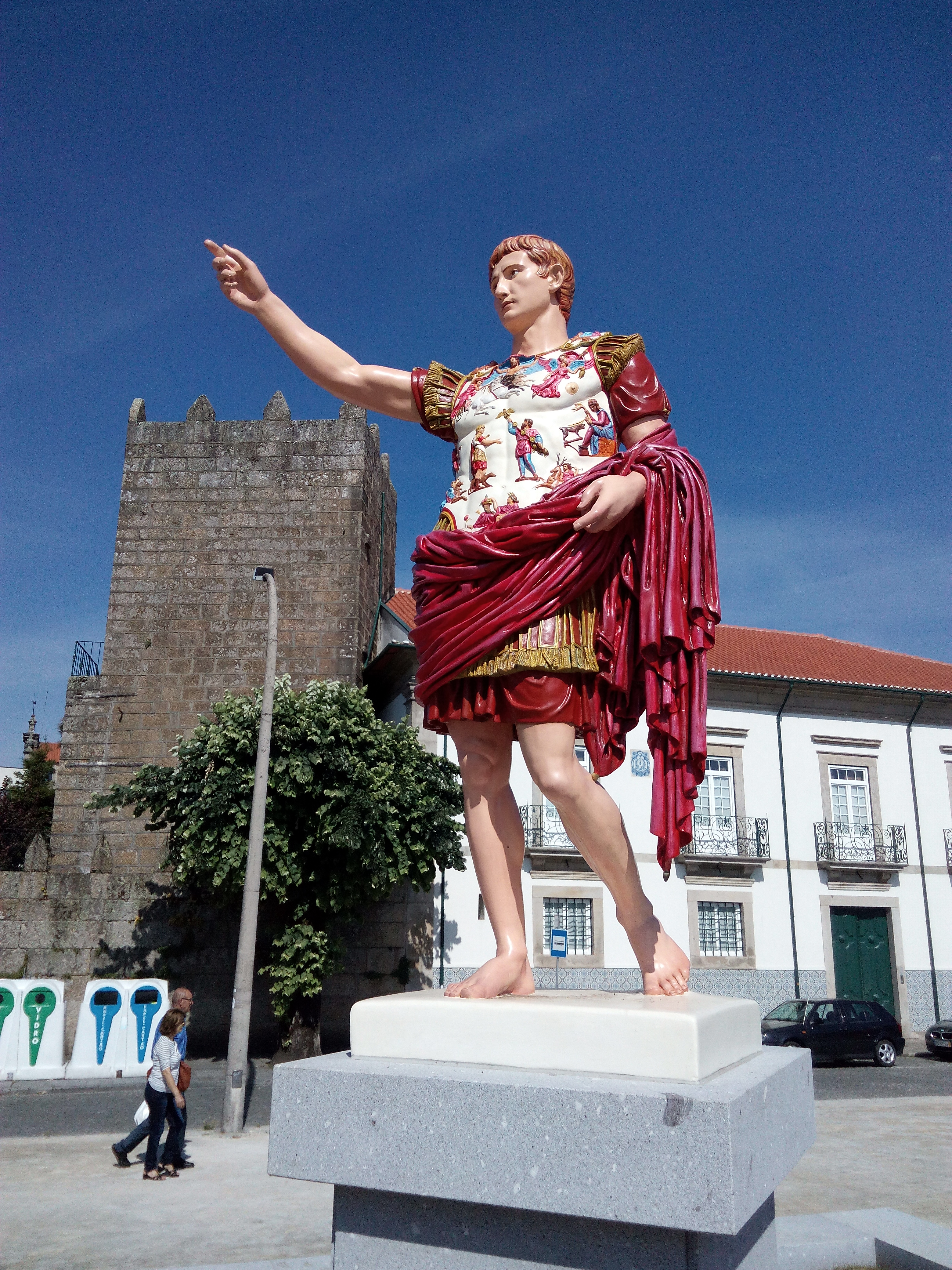 Statue in Braga Portugal